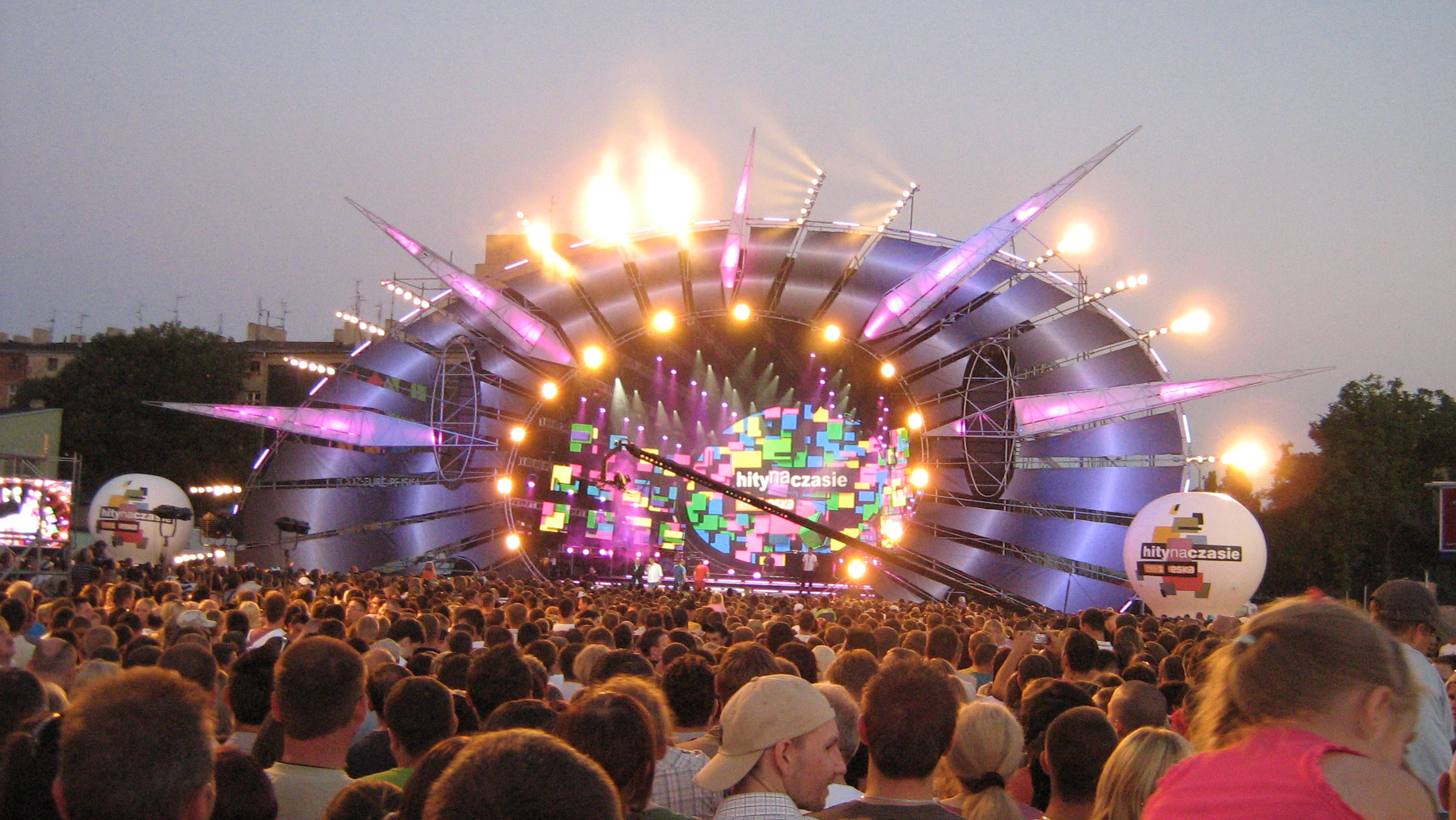 Koncert w Łodzi "Hity na czasie" z okazji 585 rocznicy nadania praw miejskich. Zbieg ulic Kościuszki i Radwańskiej